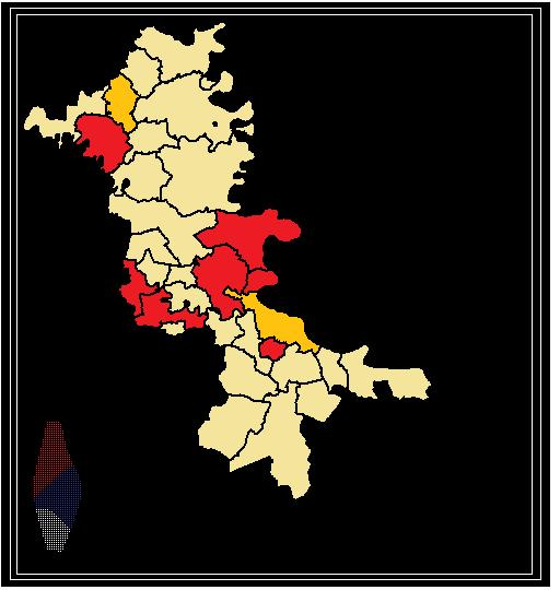 Općine u istočnoj Slavoniji, Baranji i zapadnom Srijemu